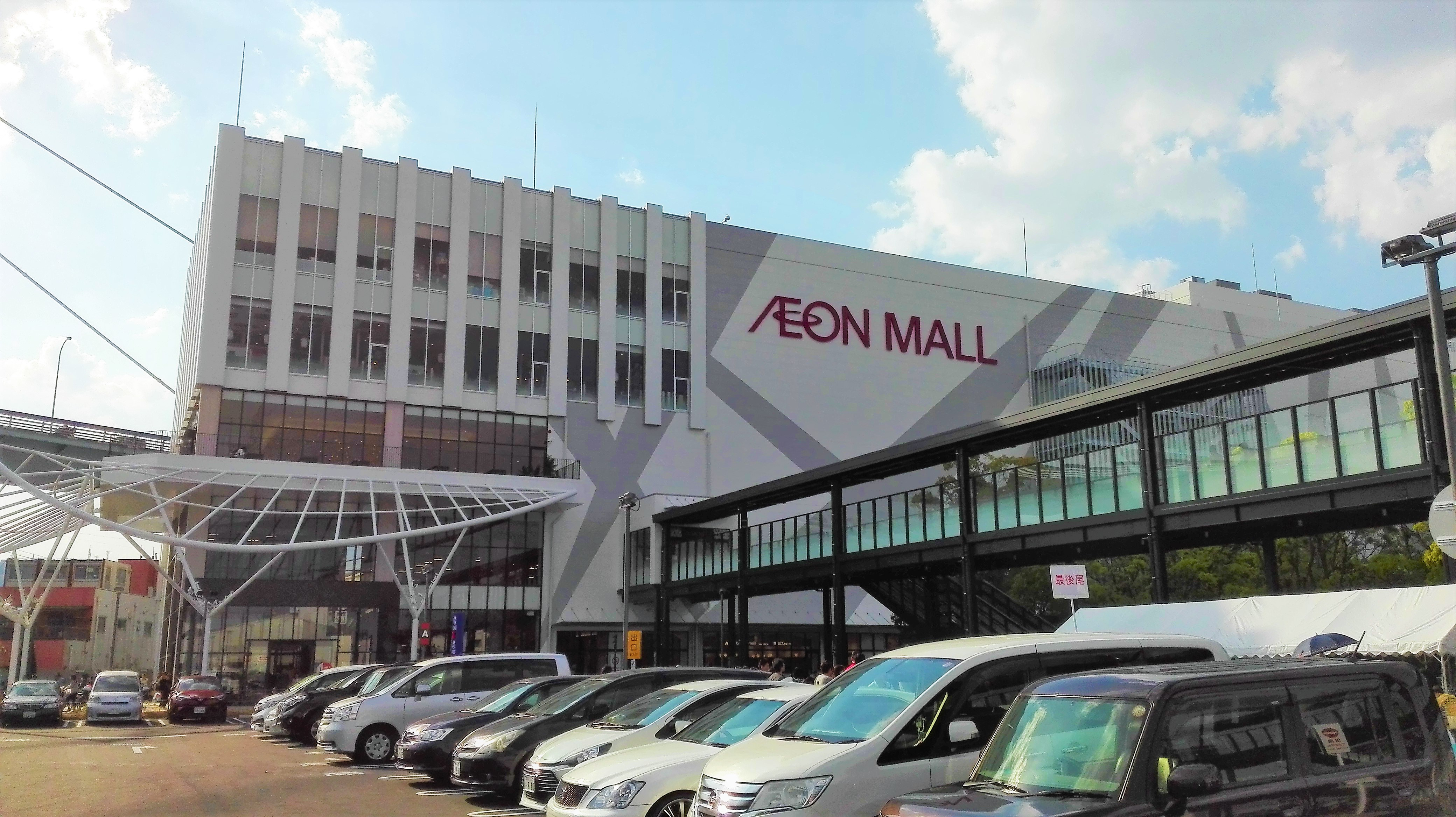 イオンモール 徳島の外観写真